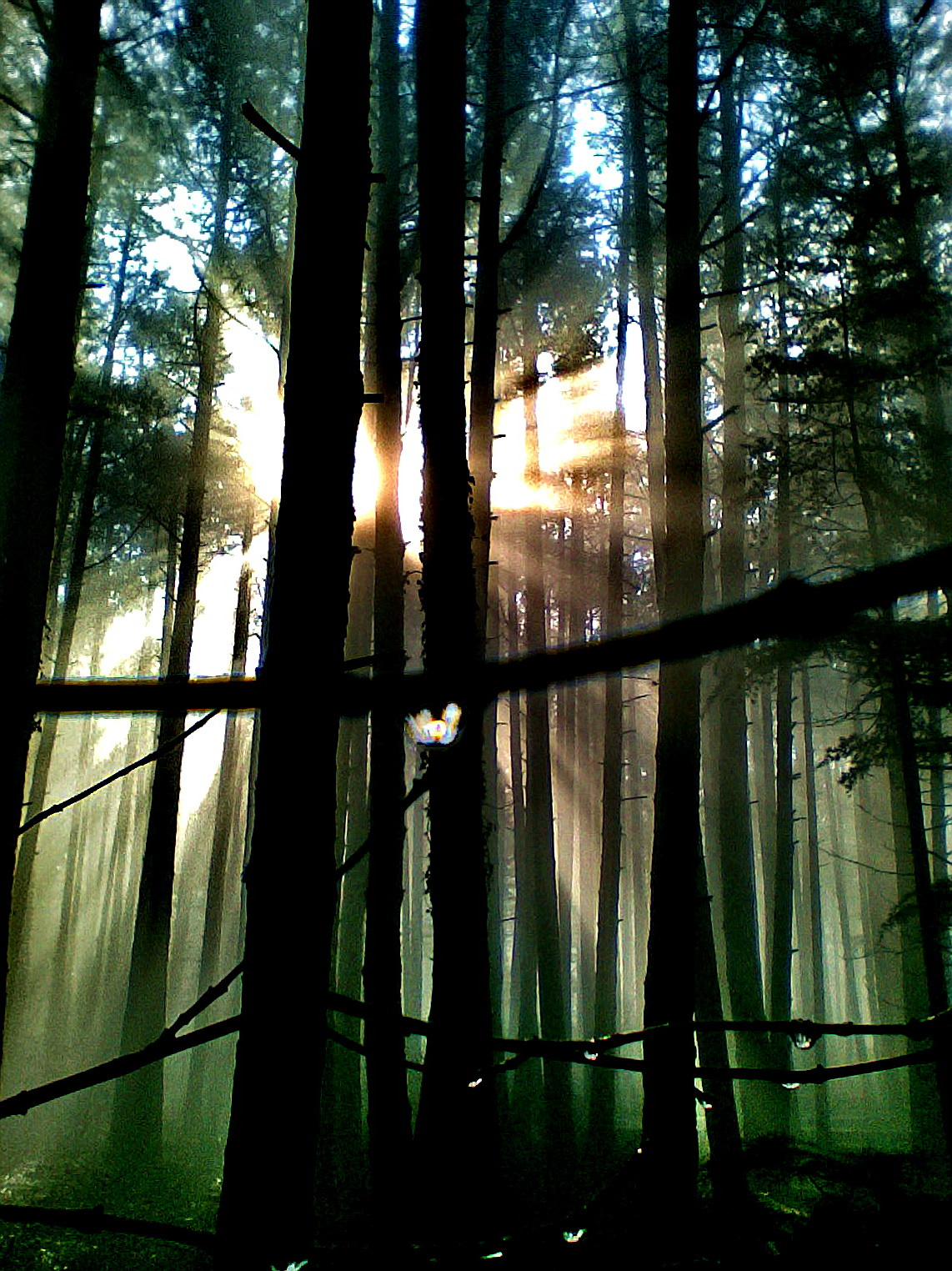 Ялтинський ГЛПЗ, м. Ялта